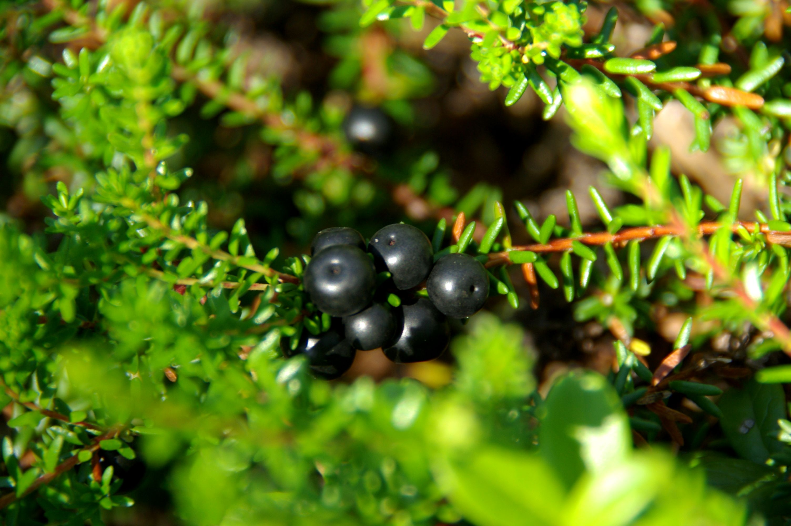 Kukemari on meie soode ja rabade igihaljas kääbuspõõsas. Sageli kasvab kukemari koos kanarbikuga, keda ta ka lehtede poolest veidi meenutab. Kukemarja lehed on vaid mõne millimeetri pikkused, väga kitsad ja tumerohelised. Kuna lehed asetsevad risti neid kandvate vartega, siis meenutavad need suuresti pisikesi okaspuude okkaid.